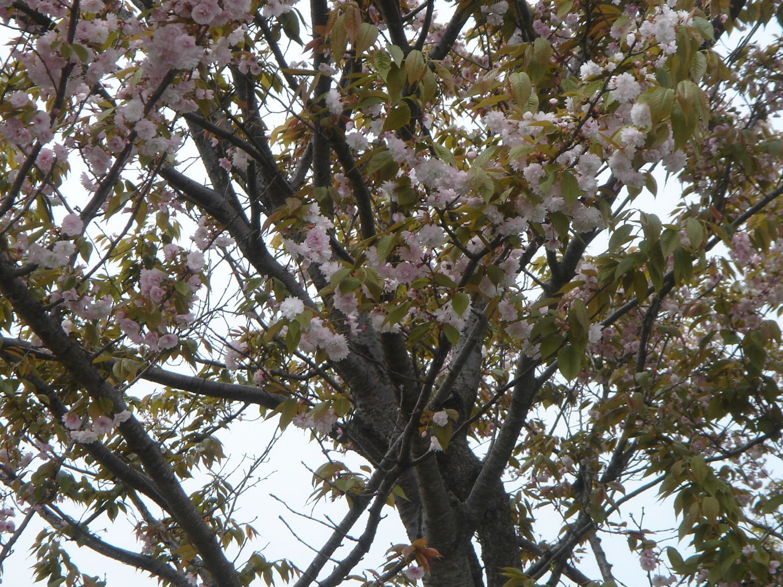 (揖斐二度桜),Ono,Gifu,Japan(岐阜県大野町)で撮影。